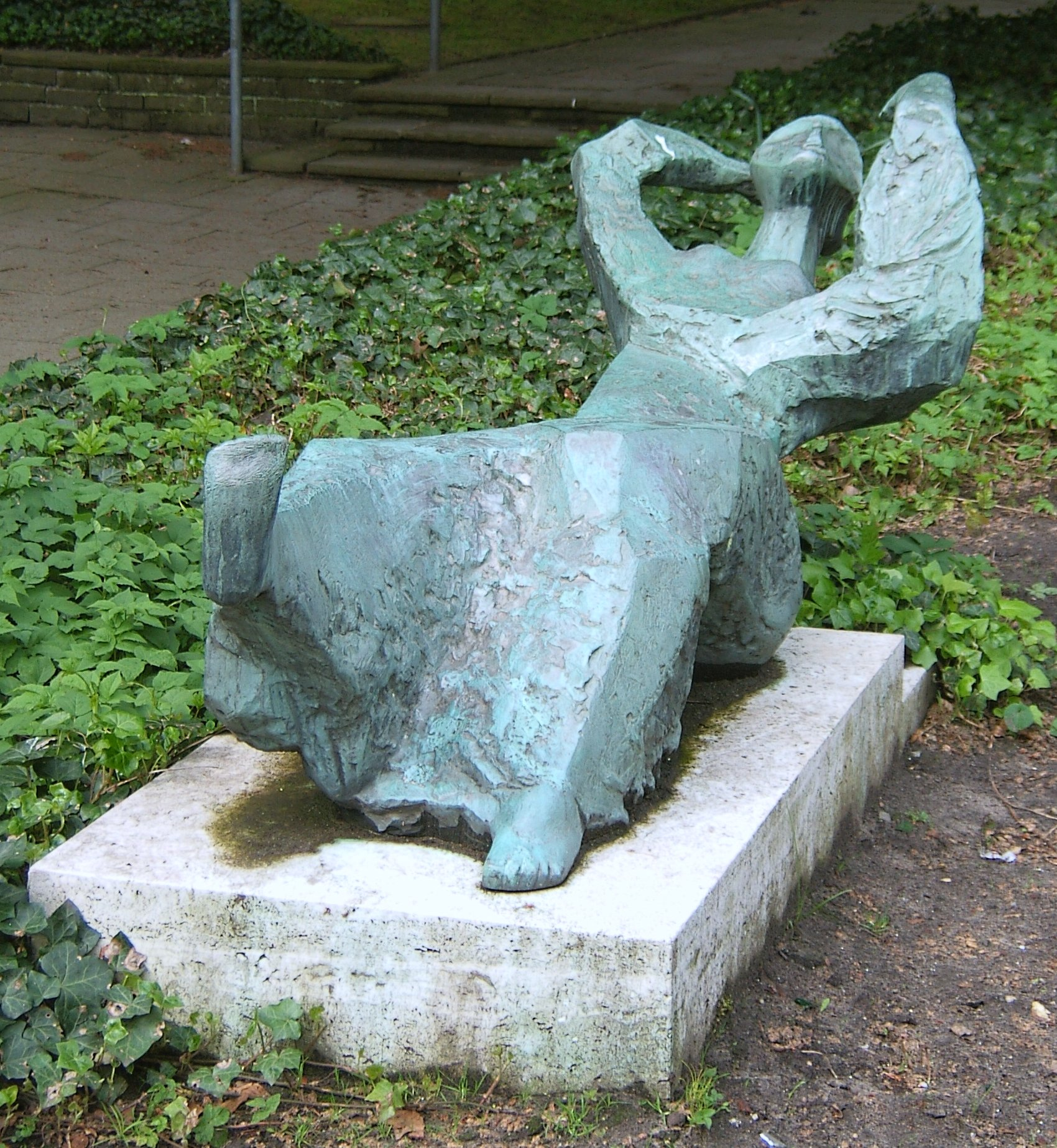 Bildbeschreibung: Hamburg, Eppendorf, Bezirksamt Nord, Skulptur "Die Liegende" Fotograf: selbst Datum: 20.5.2006